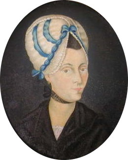 Bianca Laura Saibante, olio su pergamena